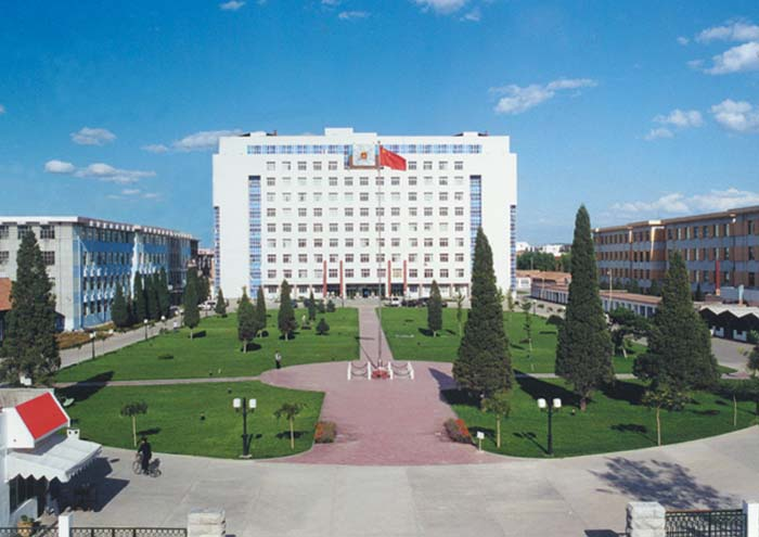 原赤峰市政府